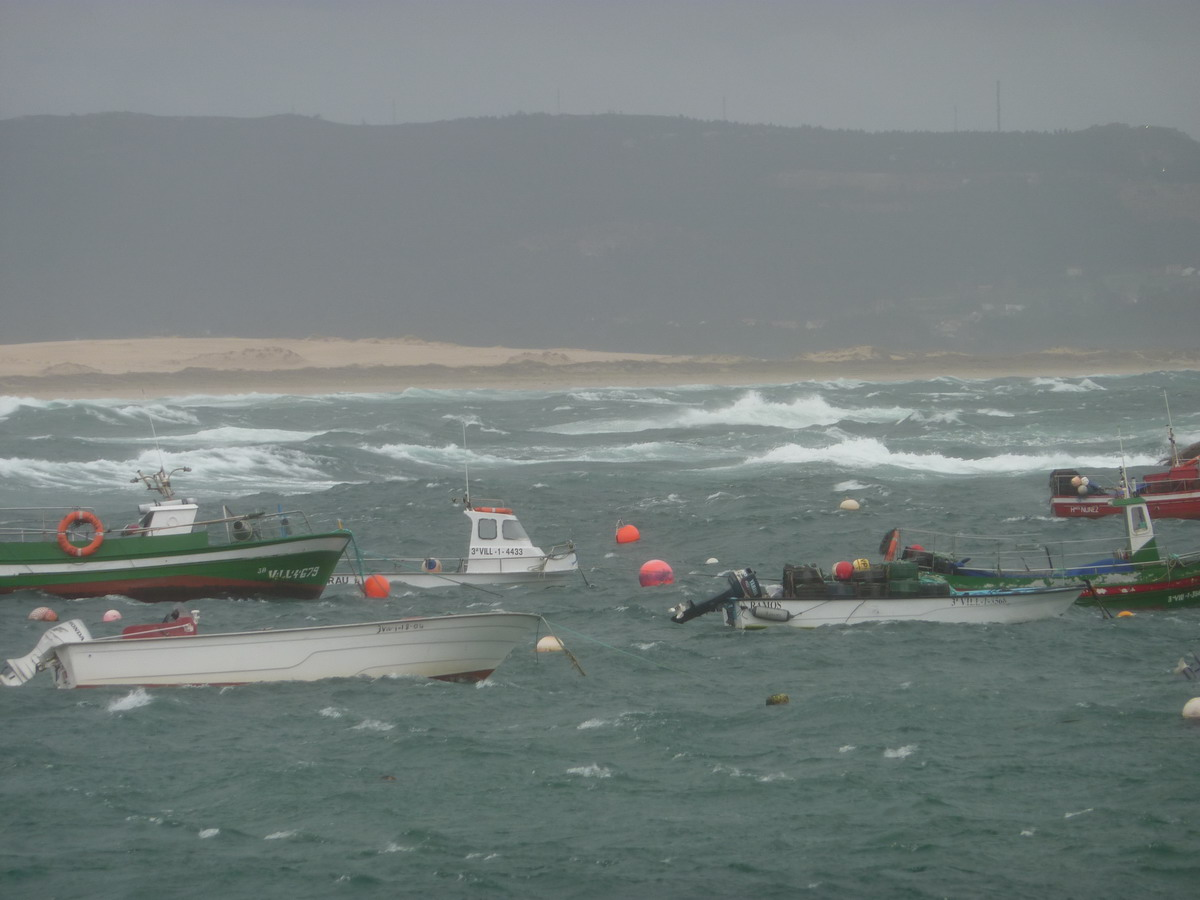 Embarcacións bailando nas olas